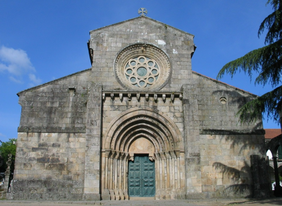 Fachada do Mosteiro de Paço de Sousa, Penafiel, Portugal